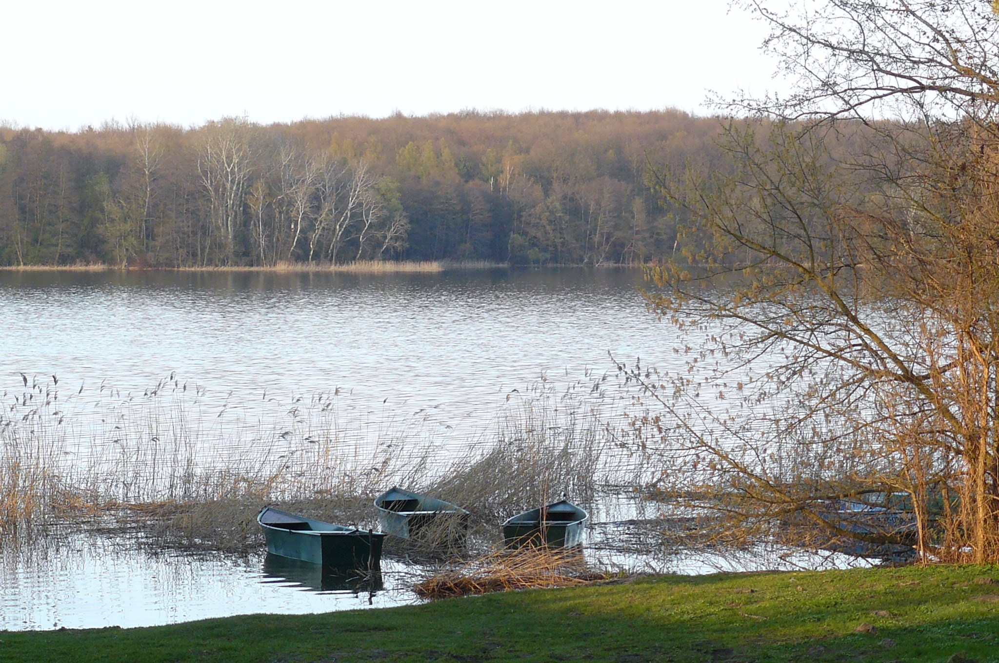 Kierskie Lake from west.